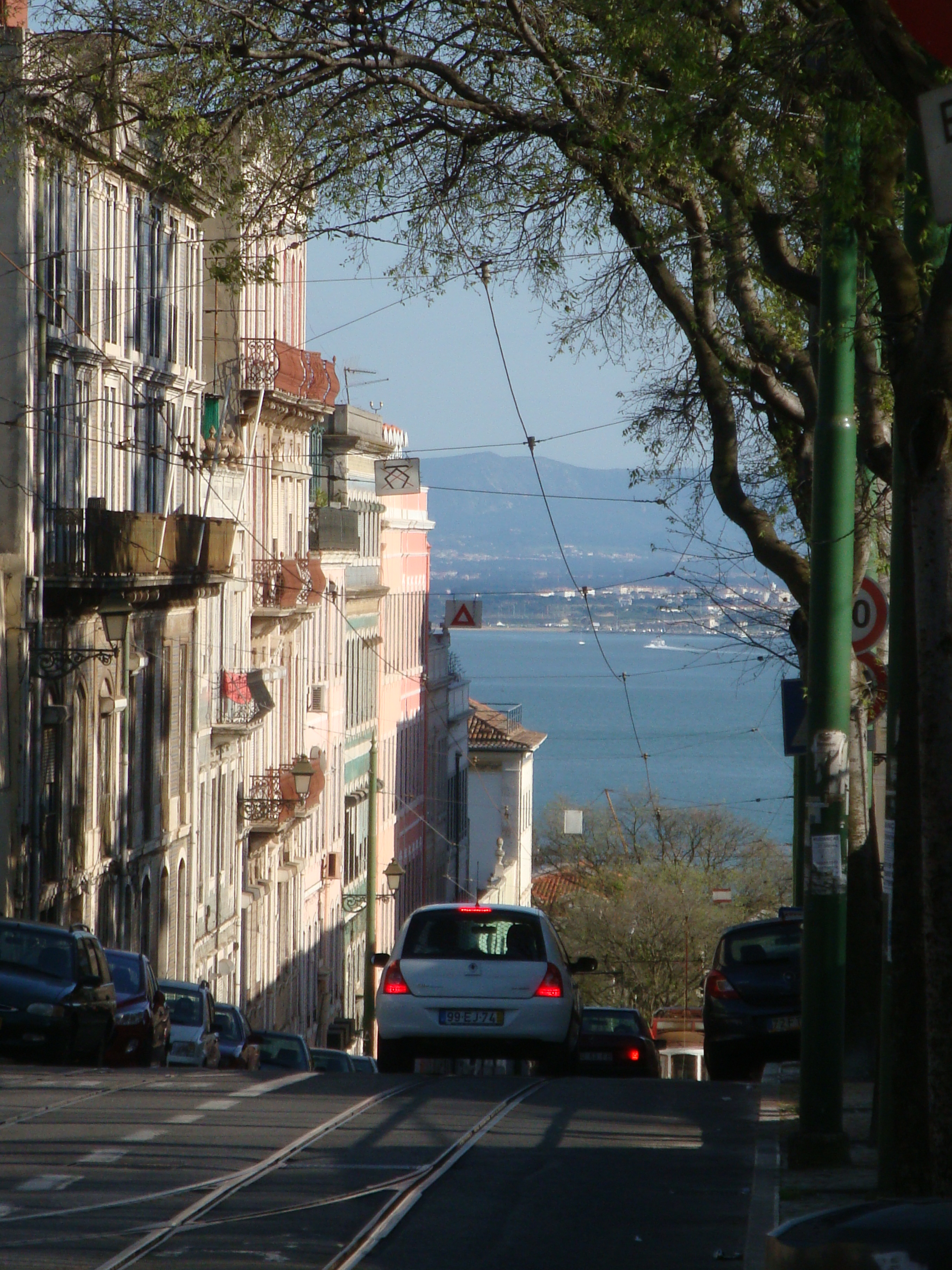 Rua da Voz do Operário, em Lisboa, com vista sobre o Rio Tejo.